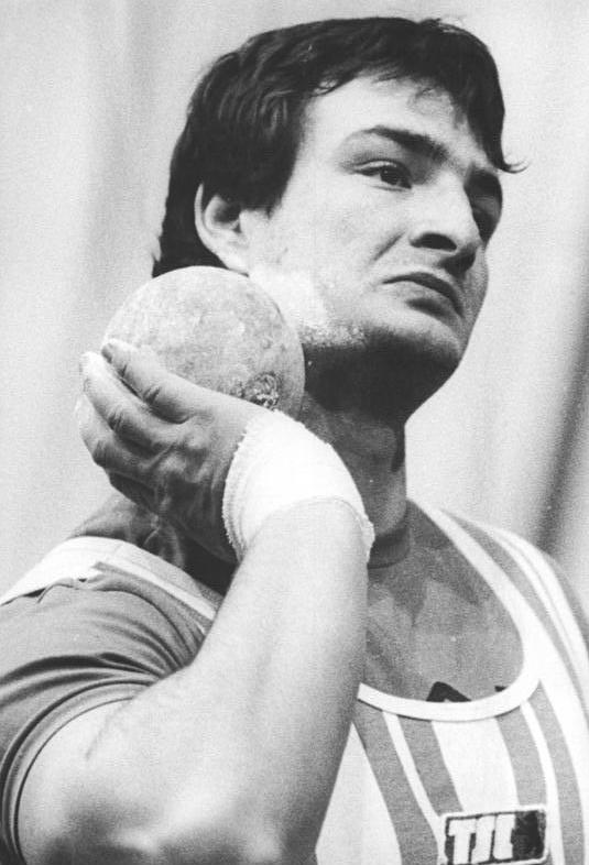 Ulf Timmermann ADN-ZB Hiekel 16.02.1985-me.-Senftenberg: DDR-Hallenmeisterschaften in der Leichtathletik-Der 22jährige Ulf Timmermann (TSC Berlin) erzielte bei den DDR-Hallenmeisterschaften der Leichtathleten in Senftenberg mit 22,15 Metern im Kugelstoßen eine neue Hallen-Weltbestleistung. Der Vizeweltmeister, der diese Weite im dritten Versuch schaffte, übertraf die elf Jahre alte Bestmarke von George Woods (USA) um 13 Zentimeter.